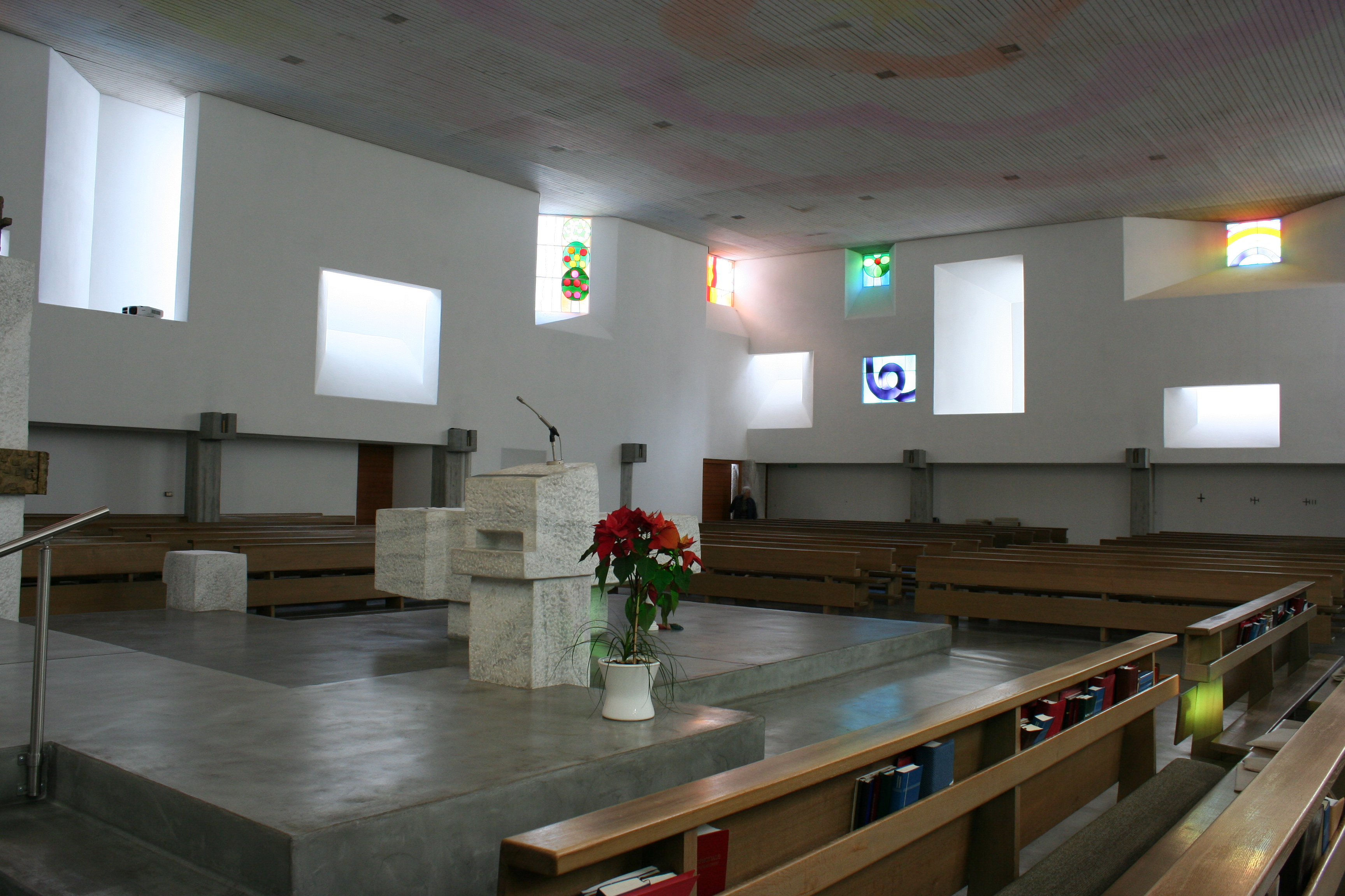 Kloster Ilanz, Kirche: Ansicht von Westen. Architektur von Walter Moser, Glasfenster von Max Rüedi, Altarraum von Alfred Huber